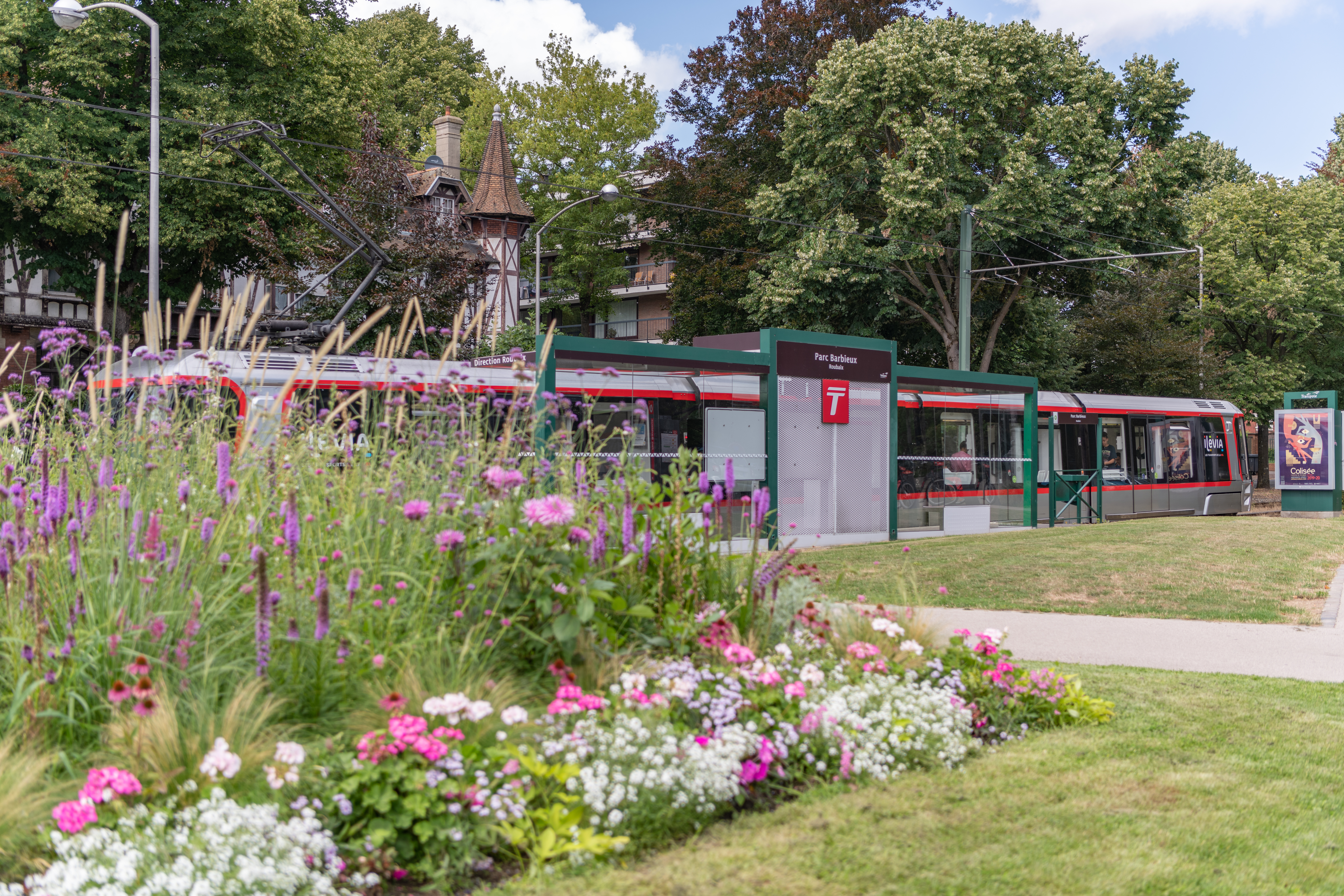 L'arret de tramway Parc Barbieux Avenue Jean Jaures. Transport. Tramway. Ilevia.